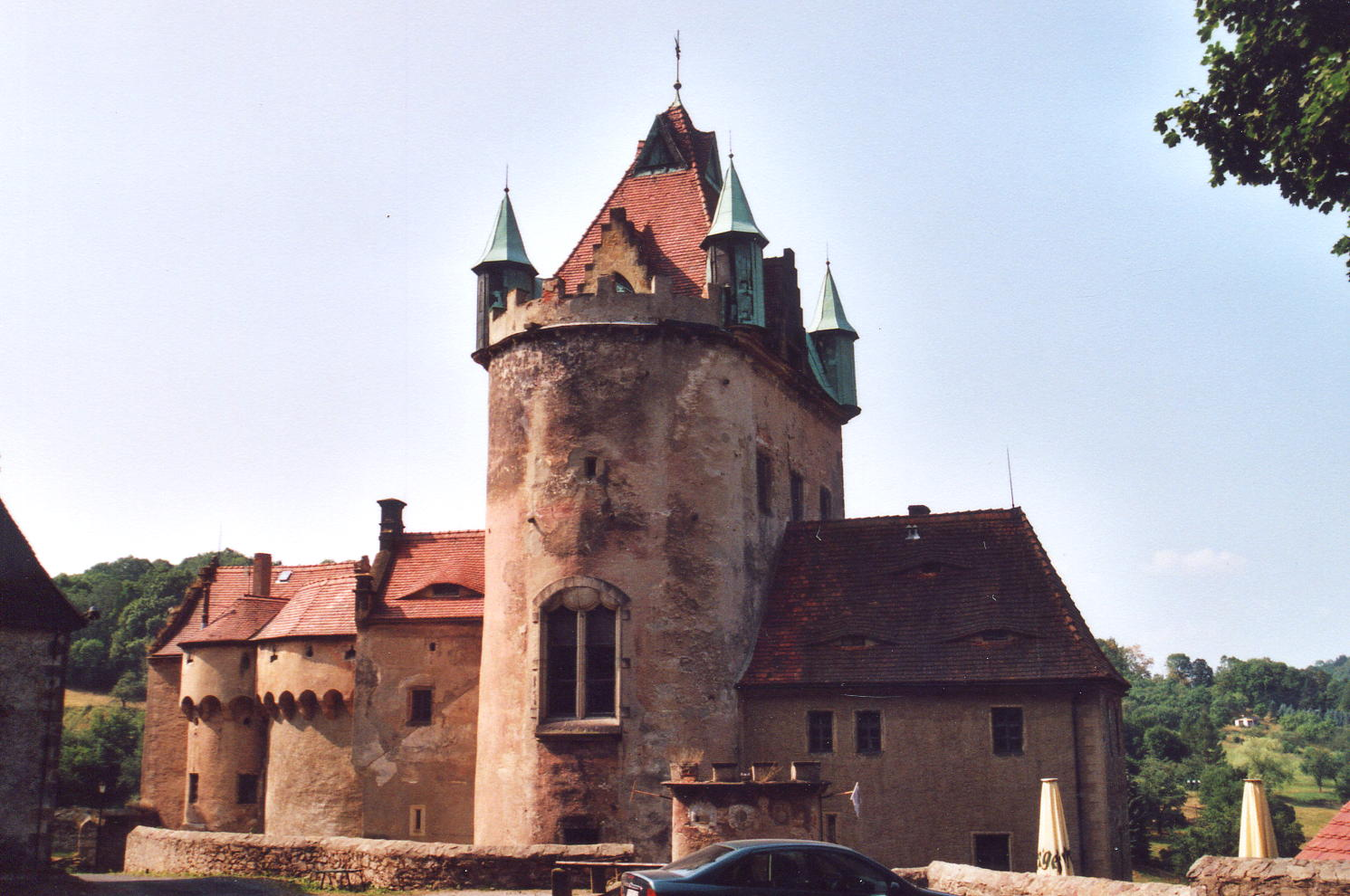 Liebstadt: Blick von der Bergseite auf Schloss Kuckuckstein.